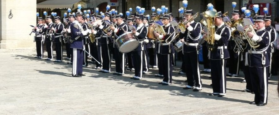 alza bandiera in piazza della libertà san marino